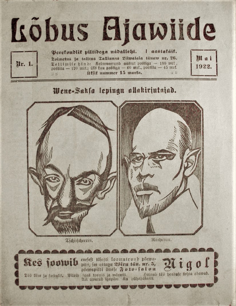 Ajaleht Lõbus Ajaviide